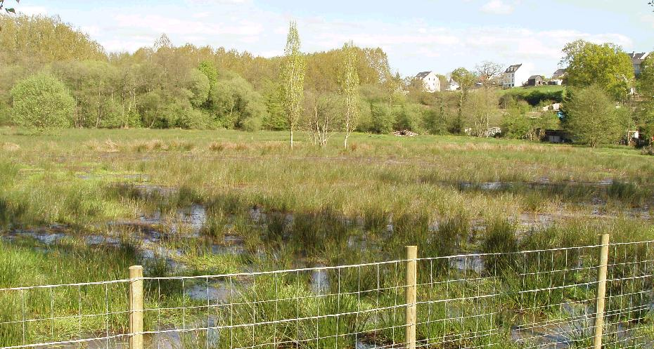 Prairies humides (inondées) du Pont Marin à Vitré